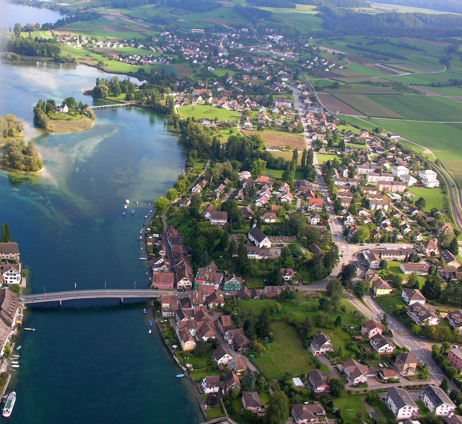 Switzerland, Canton of Schaffhausen, Aerial view of Stein am Rhein